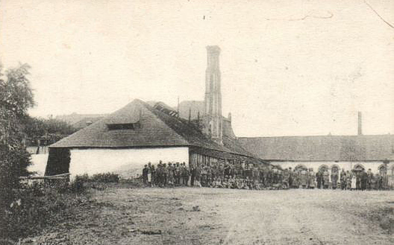 залізоробний завод Гамора (с.Довге)